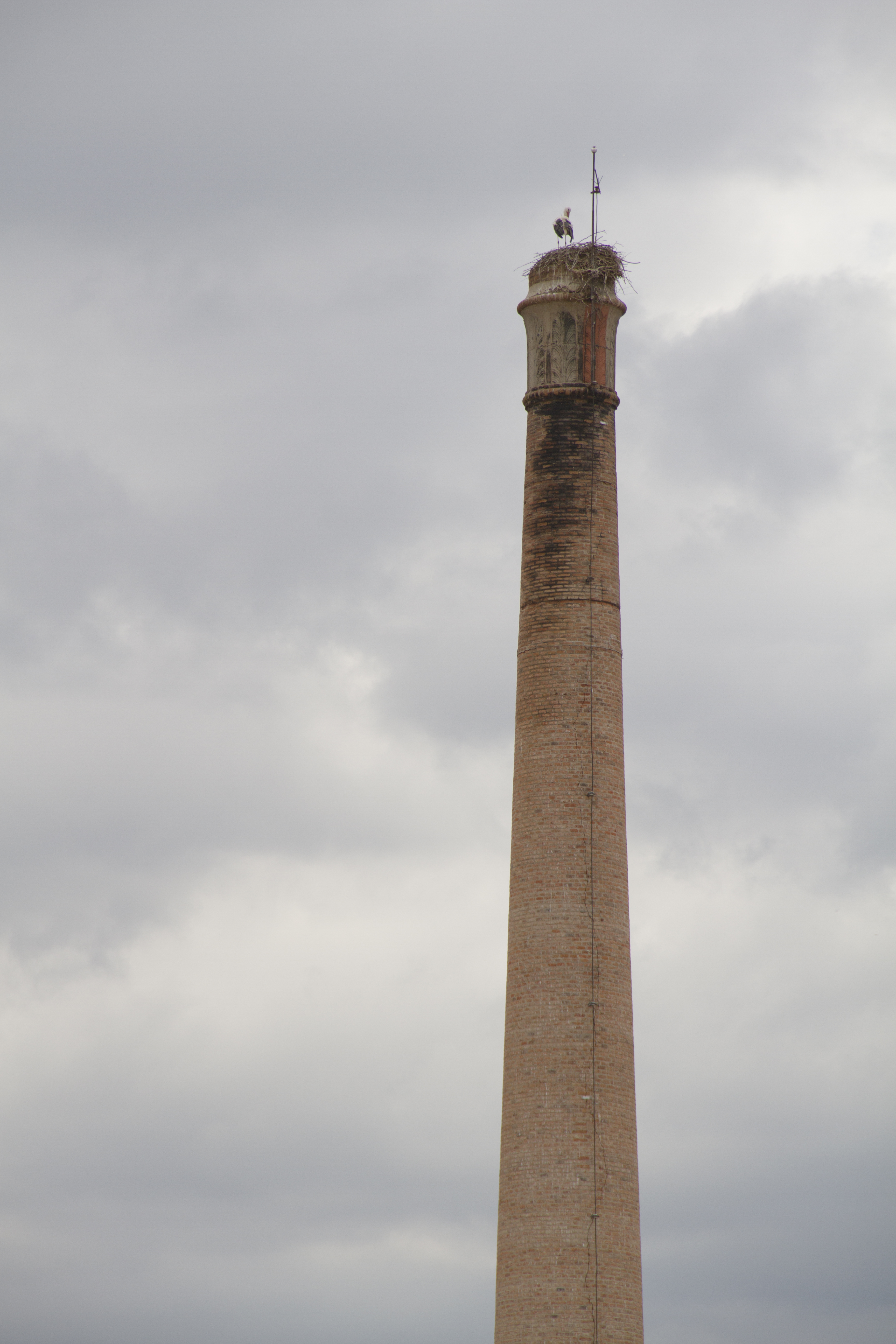 Navas de Oro